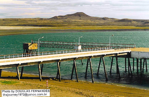 San Julián Bay, Santa Cruz Province, Argentina.